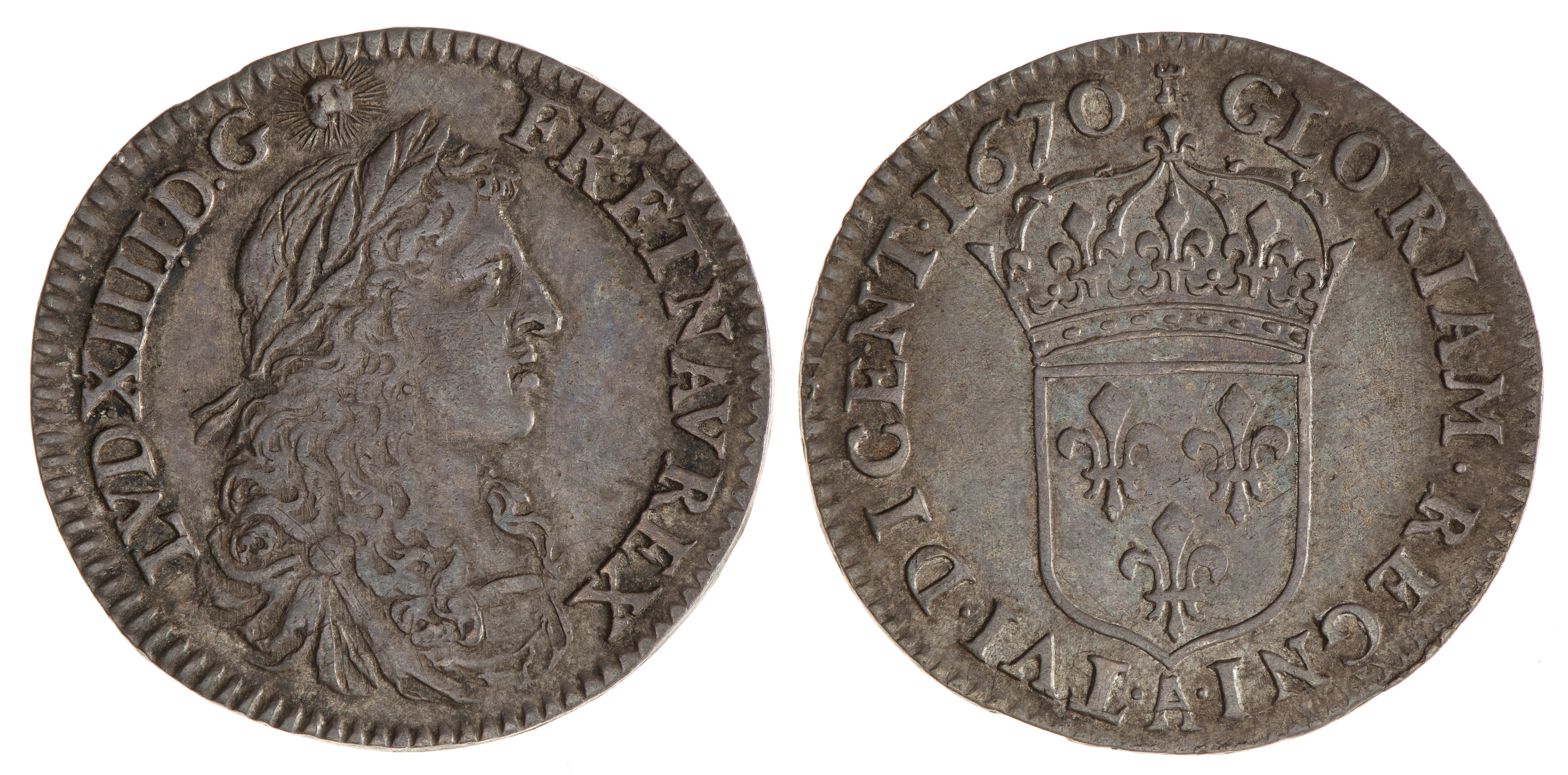 Monnaie de Louis XIV pour le Canada, 5 sols (1/12e d'écu), 1670, argent, diamètre 2 mm, poids 2,29 g. Avers : Buste juvénile du roi, les cheveux longs retombant sur la poitrine. Au-dessus, soleil rayonnant. Revers : à 12 h (tour) GLORIAM.REGNI.TVI.DICENT 1670. Écu de France couronné. Lettre d’atelier à la pointe de l’écu, "A" Paris. Collection du Victoria Muséum, Victoria, Australie.